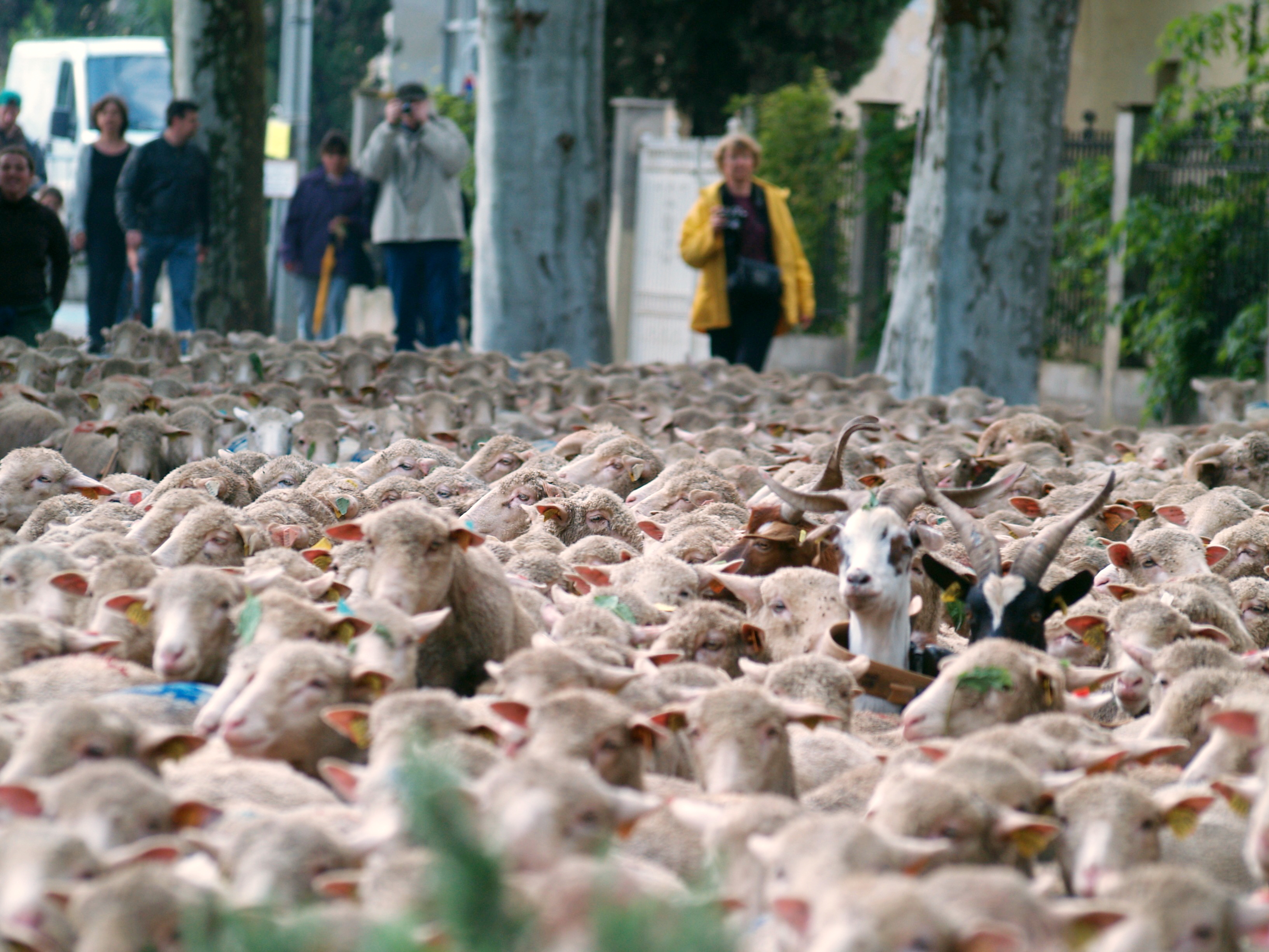 43°38′9.4″N 4°48′27.4″E / 43.635944°N 4.807611°E